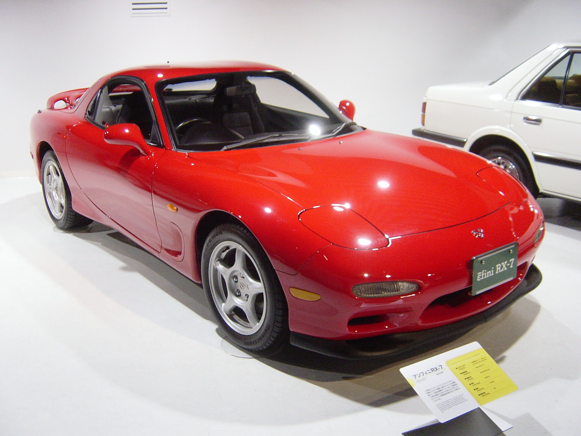 Mazda RX7 3rd generation(マツダ・RX-7、Mazda RX-7),Mazda Museum.